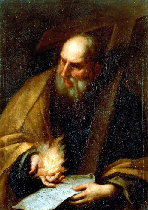 San Barnaba